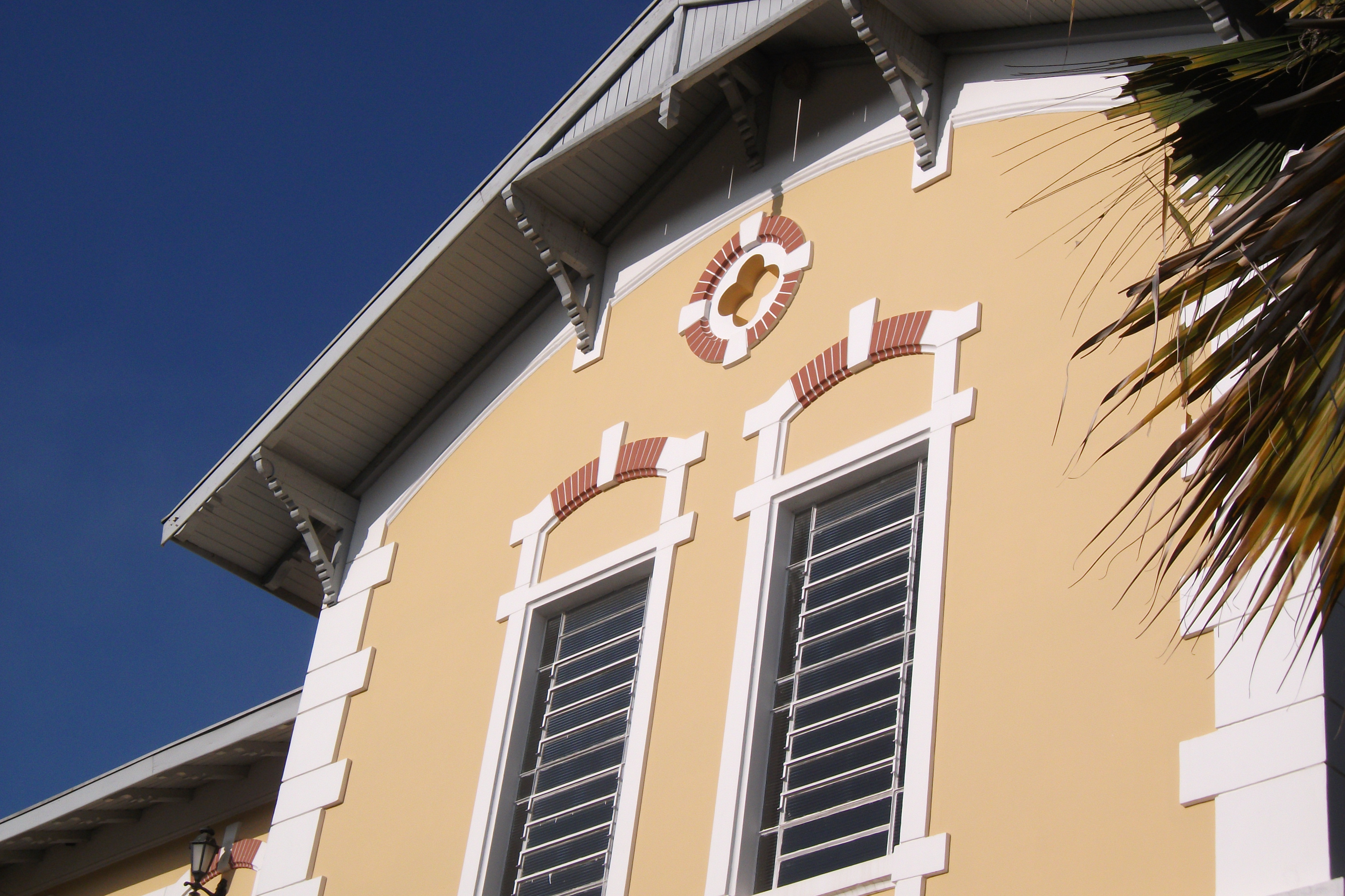 Detalhes da fachada da Pinacotéca de Jundiaí.